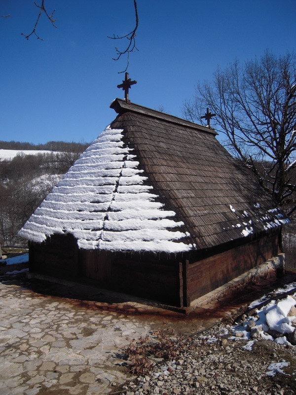 Црква_брвнара_Св._Николаја (Товиловићи-Крупе на Врбасу)